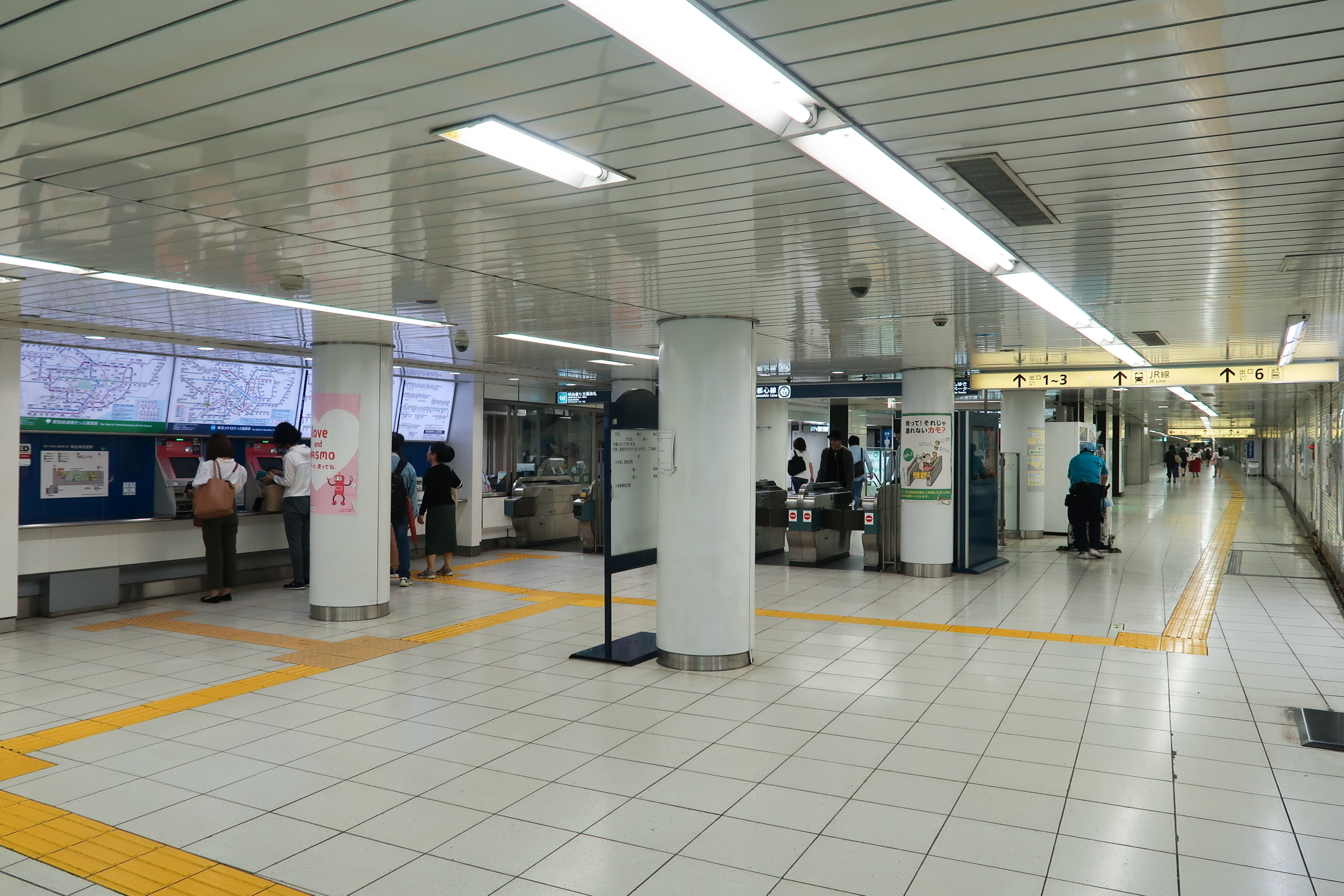 Meiji-jingumae Station